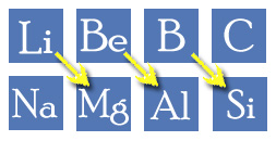 Çapraz İlişki şeması Zakir Yenilmez - 2006